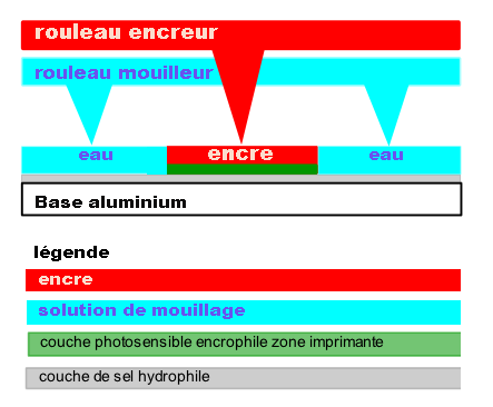 dessin perso.